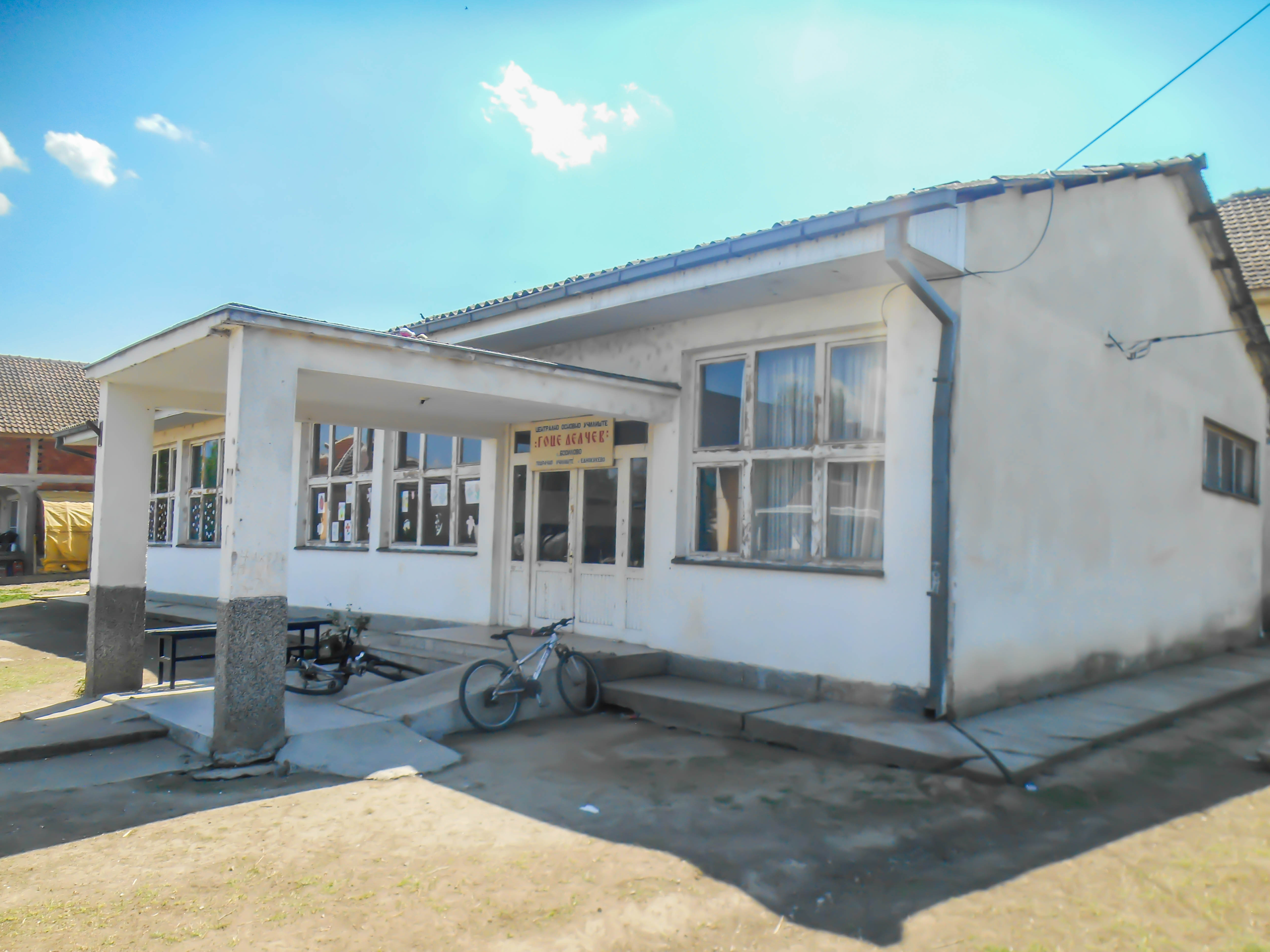 Основно училиште „Гоце Делчев“ - Еднокуќево